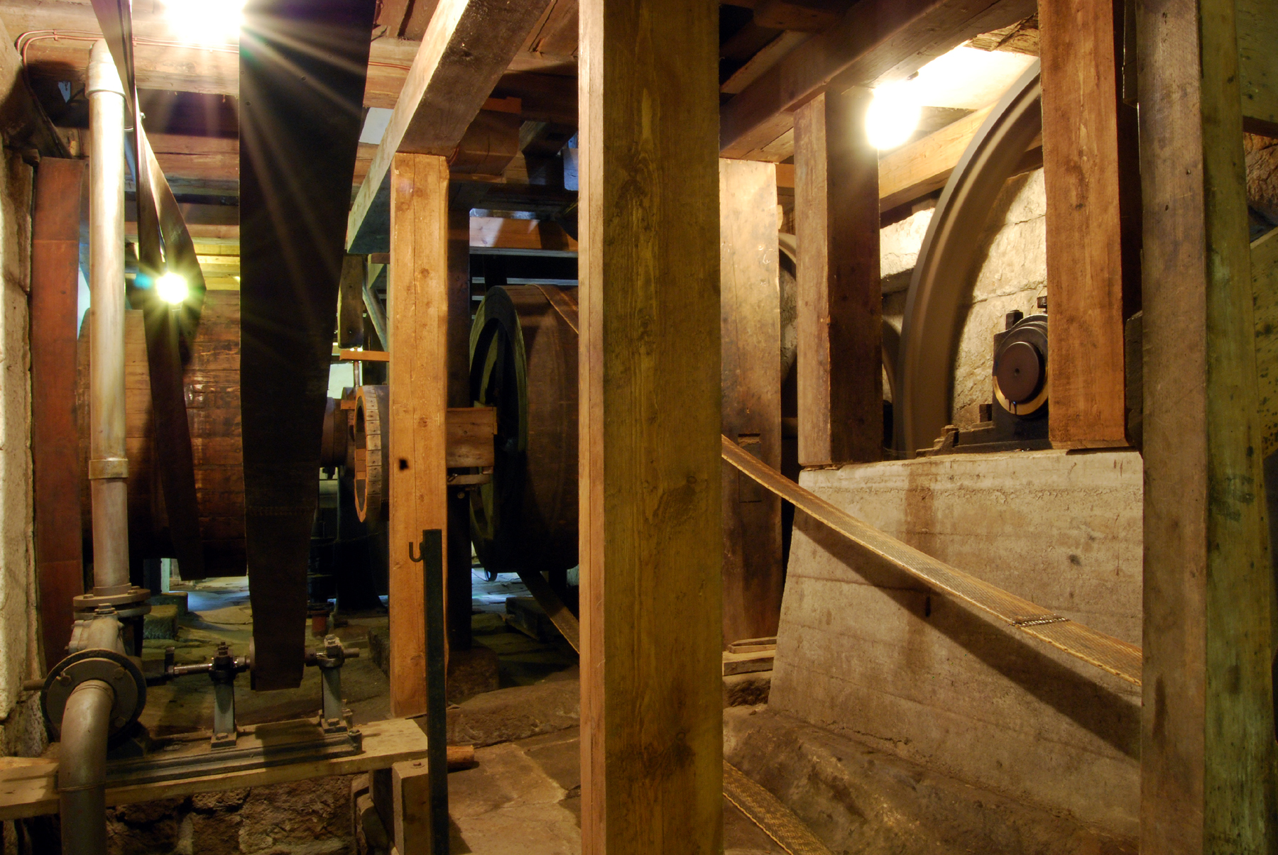 im Kerngebiet der Sächsischen Schweiz steht die Neumannmühle. Namensgeber ist die Familie Neumann, in dessen Besitz diese Sägemühle seit 1791 ununterbrochen ist. Seit dem 08. Juni 1996 ist sie Technisches Denkmal und für die Öffentlichkeit zugänglich. Wanderparkplatz, Bushaltestelle, Gaststätte und Wanderherberge ergänzen diesen Ort inmitten des wildromantischen Kirnitzschtales.